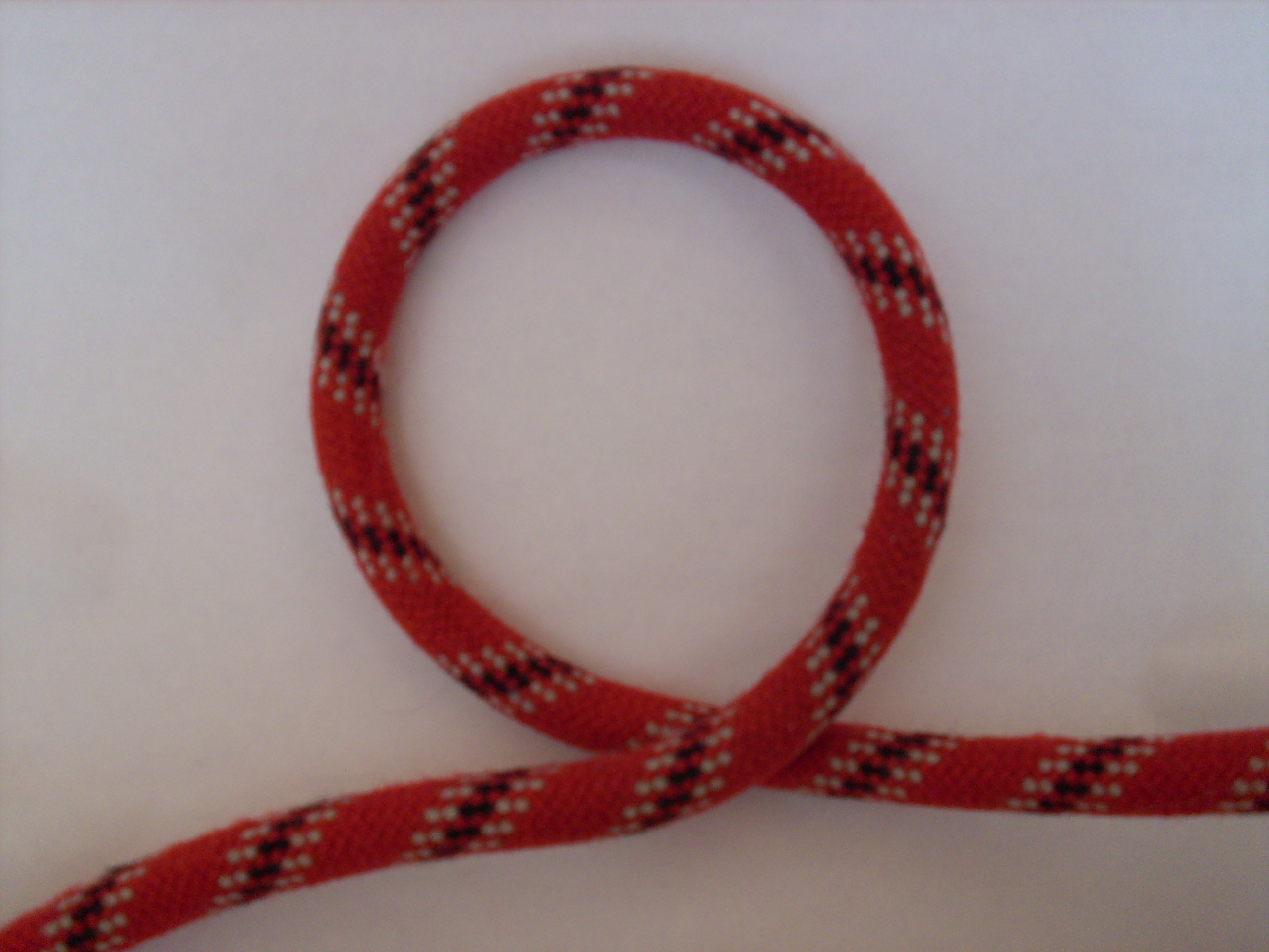 Auge.